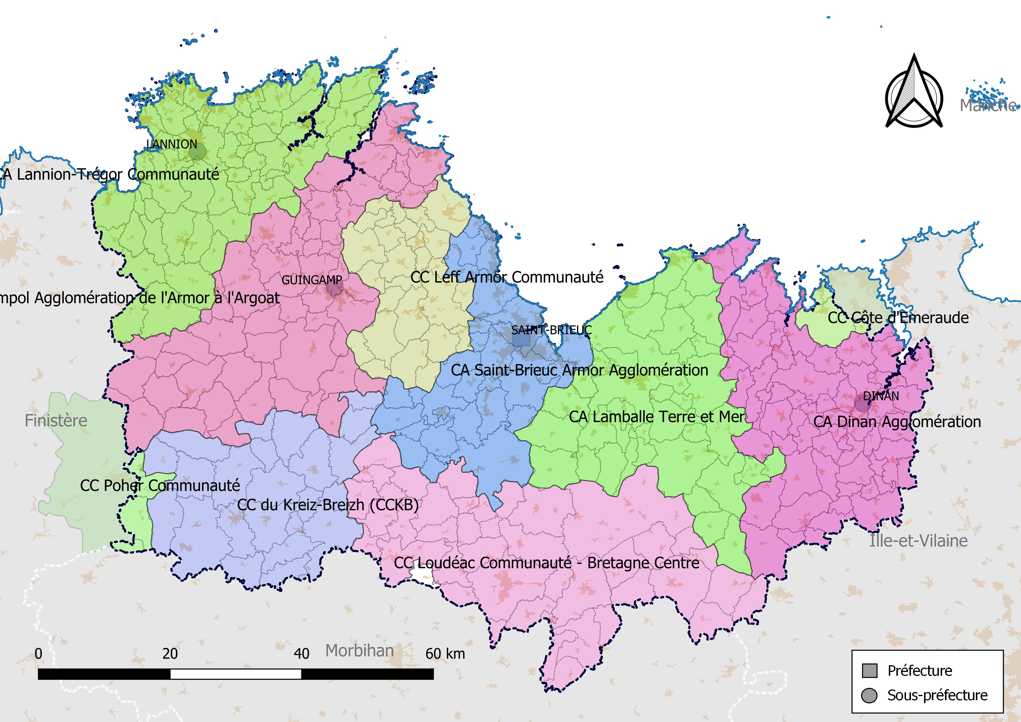 Carte des intercommunalités du département des Côtes-d'Armor, France. Composition au 1er janvier 2019